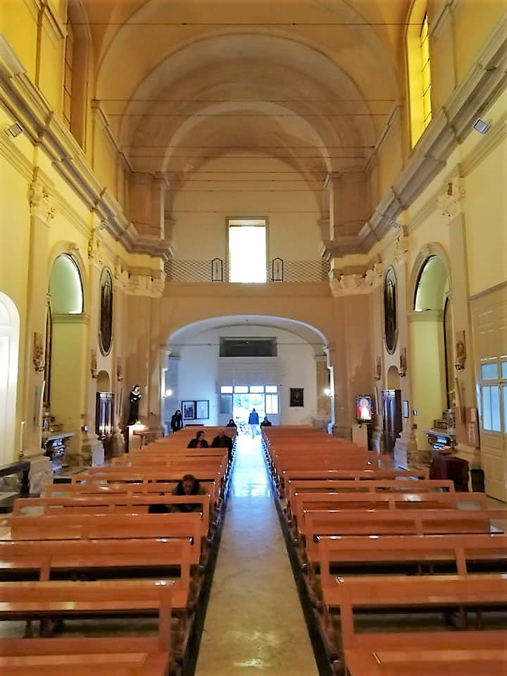 Controfcciata.